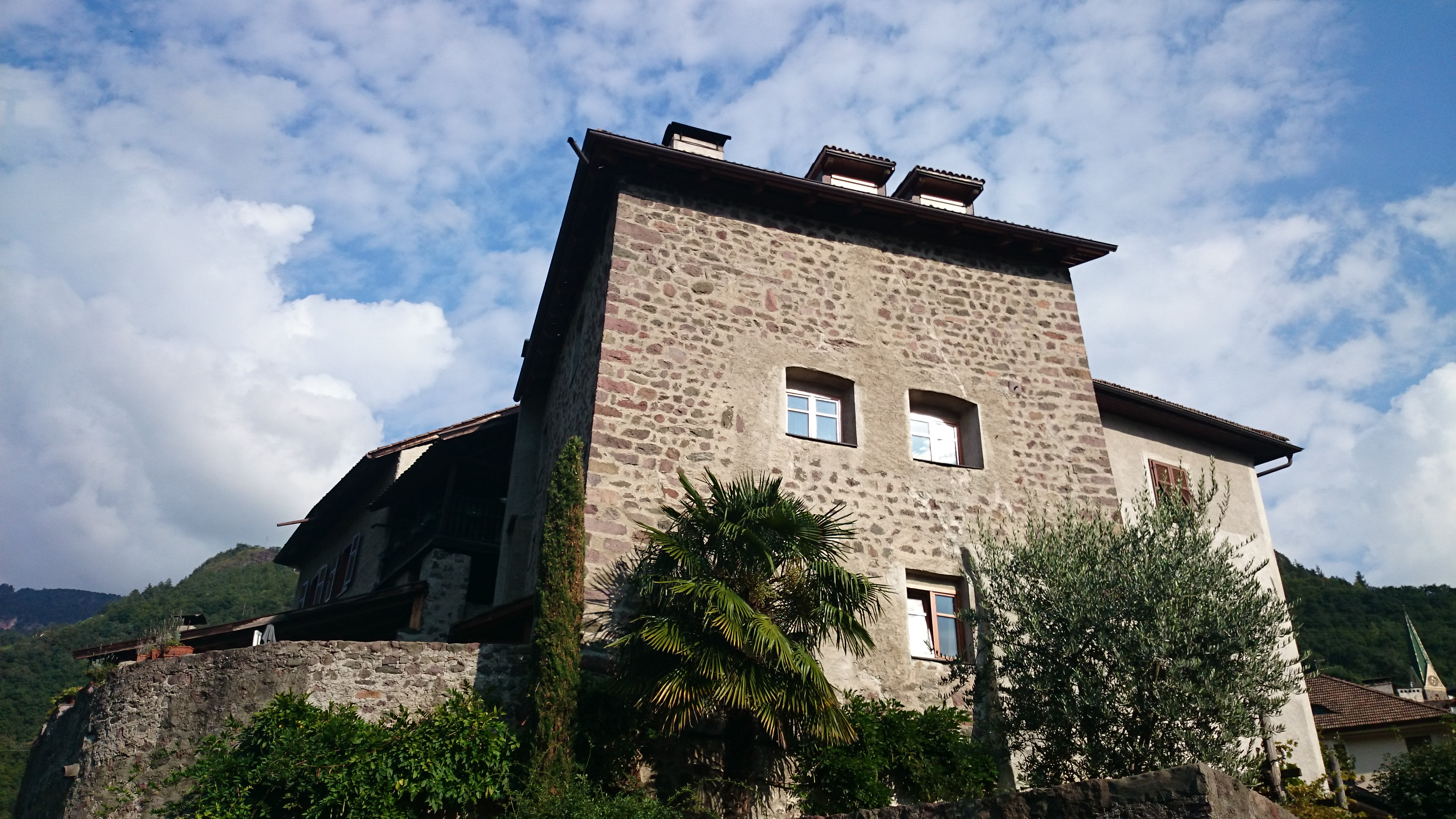 Rendelstein in Bozen - alter Baubestand im Südwesten